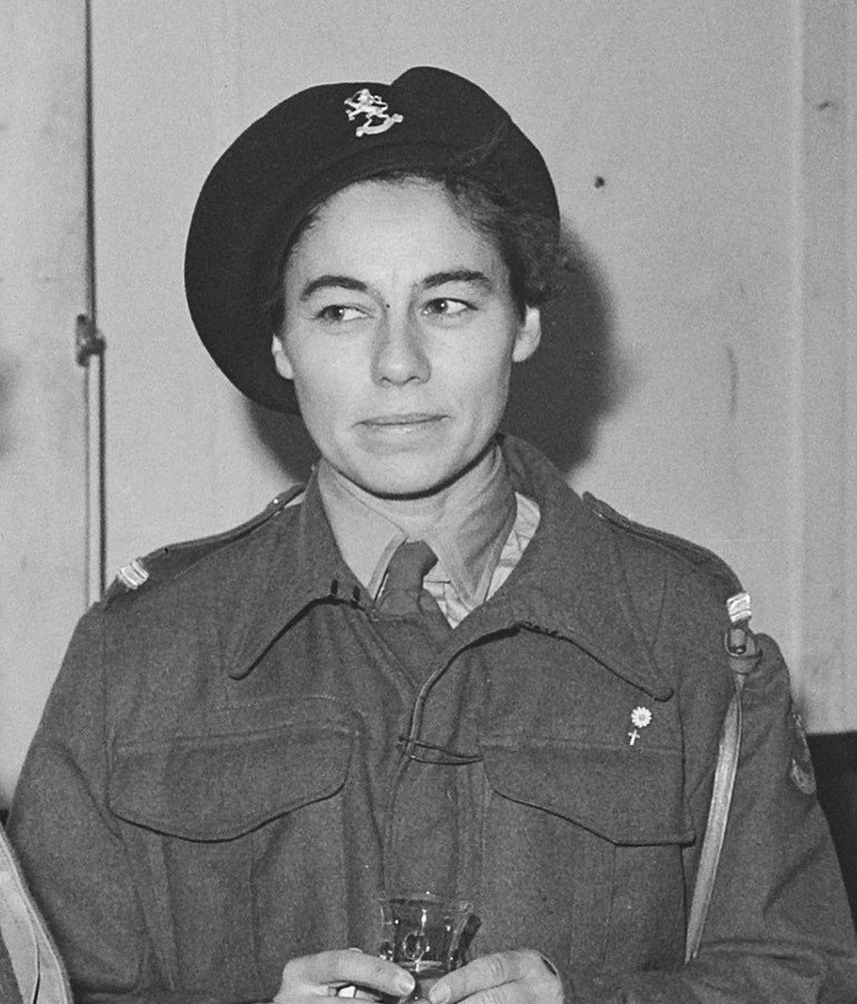 Collectie / Archief : Fotocollectie Anefo Reportage / Serie : HIE [Holland in England] / Anefo Londen serie Beschrijving : Bezoek van prinses Juliana aan het recent opgerichte Vrouwen Hulp Korps. De prinses in gesprek in de kantine Annotatie : In het midden Emmy Rutten-Broekman Datum : september 1944 Locatie : Groot-Brittannië, Wolverhampton Trefwoorden : bezoeken, gesprekken, militairen, prinsessen, tweede wereldoorlog Persoonsnaam : Juliana (prinses Nederland), Rutten-Broekman, Emmy Instellingsnaam : VHK, Vrouwen Hulp Korps Fotograaf : Onbekend / Publiek Domein, [onbekend] Auteursrechthebbende : Nationaal Archief Materiaalsoort : Glasnegatief Nummer archiefinventaris : bekijk toegang 2.24.01.09 Bestanddeelnummer : 935-2621